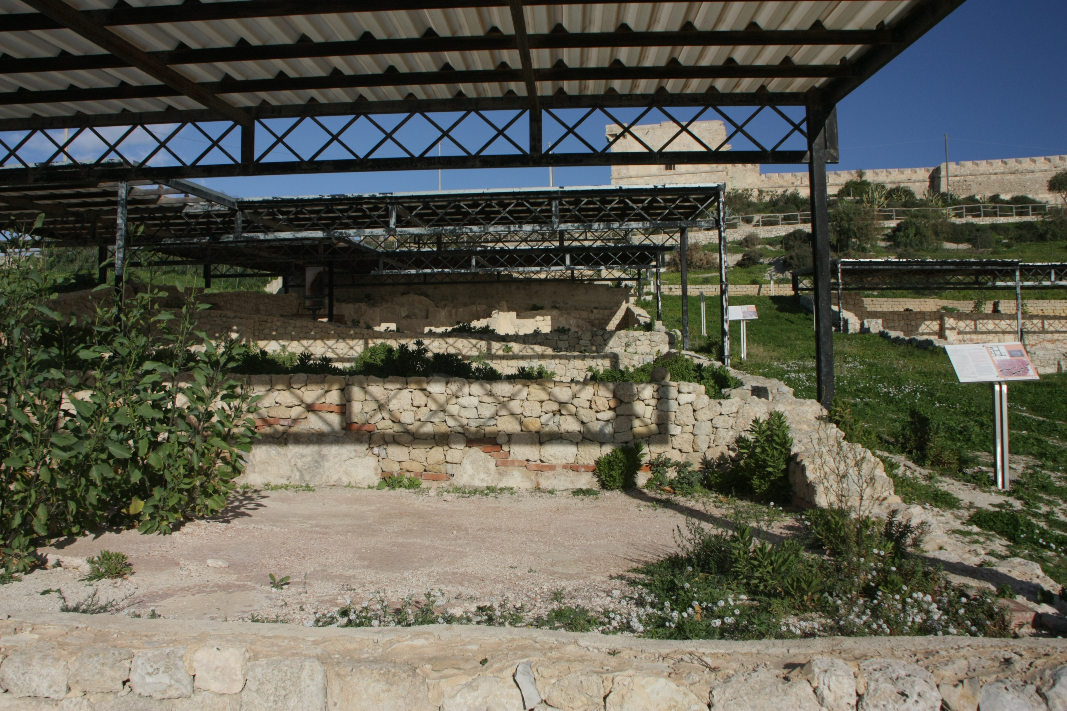 Acropoli di Licata